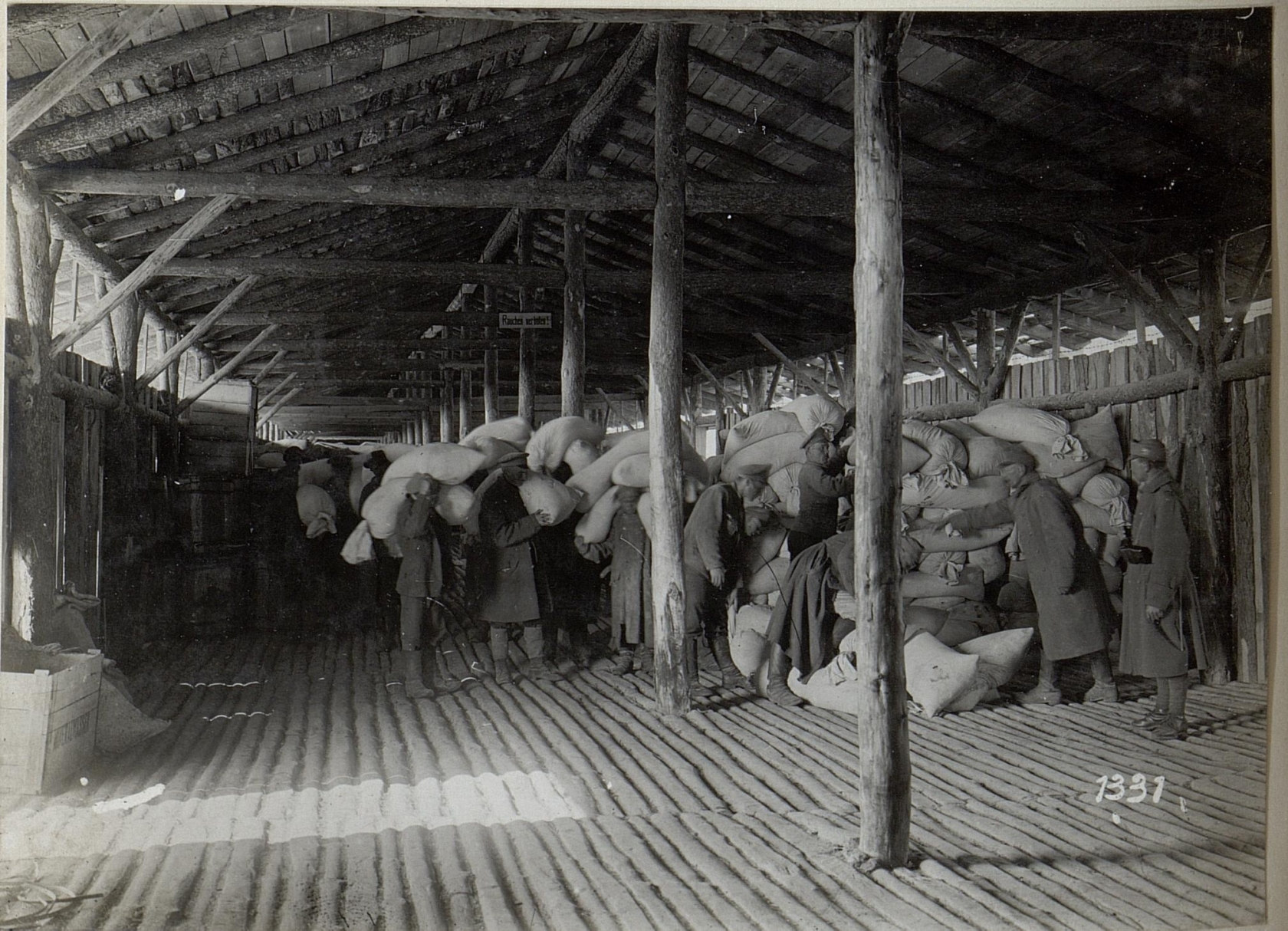 Etappenmagazin der 4. k.u.k. Armee nahe Kowel